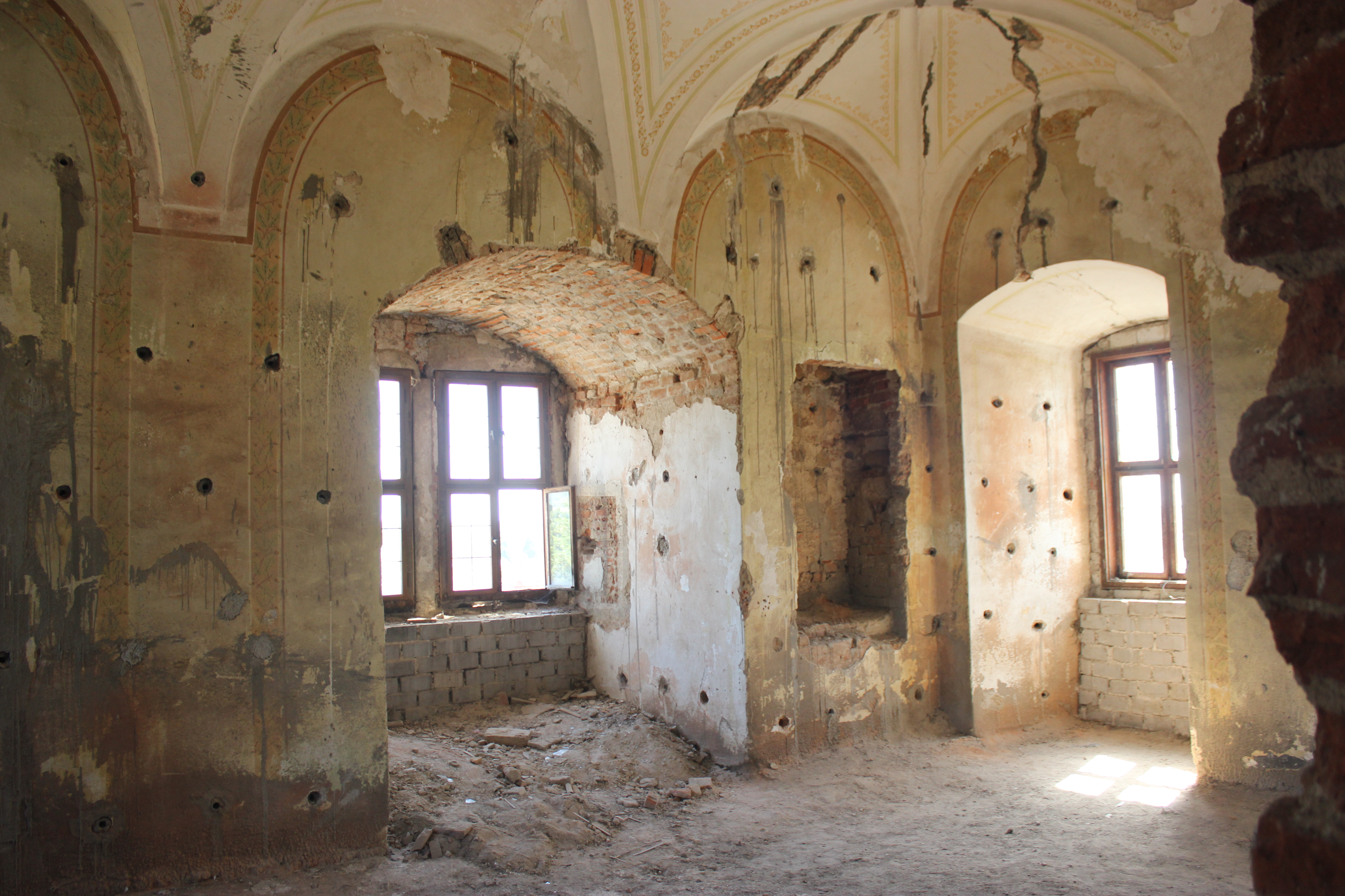 Interiér, prostor ve věži. Zámek Rožmitál